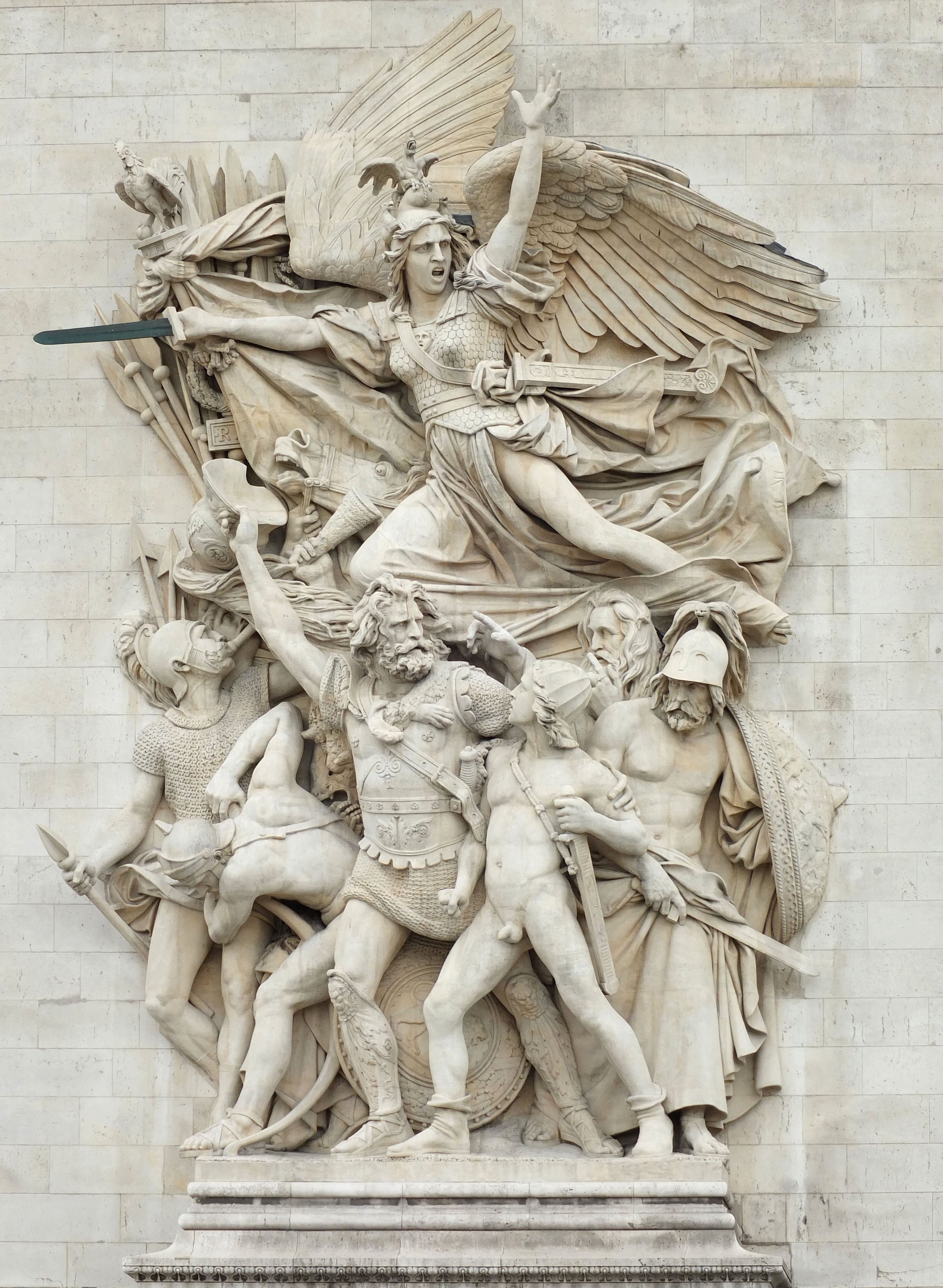 La Marseillaise (départ des volontaires de 1792) Sculpture de François Rude, terminée en 1836 - Arc de Triomphe de L'Etoile, Paris